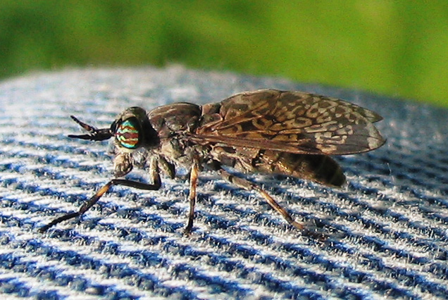 Beschreibung: Bremse (Tabanidae) / Nach einem Schlag mit der flachen Hand. Fotograf: Darkone, 18, Juni 2005